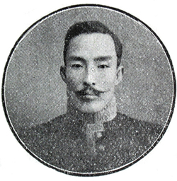 1907년 6월 경상북도 관찰사 재직 중의 박중양